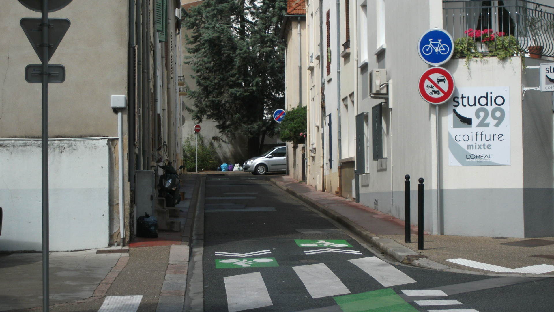 La rue Laprugne à Vichy. Cette rue débouche sur l'avenue Doumer. Depuis juillet 2011, cette rue est interdite aux véhicules à moteur, les vélos sont autorisés.Circonstances : Création d'un chemin pour les vélos entre l'avenue de Lyon et le Pont de Bellerive.Panneaux : Lacroix signalisation, 2011Par rapport à la version du 6 juillet 2011, un panneau supplémentaire a été ajouté : le panneau de piste ou bande cyclable obligatoire.